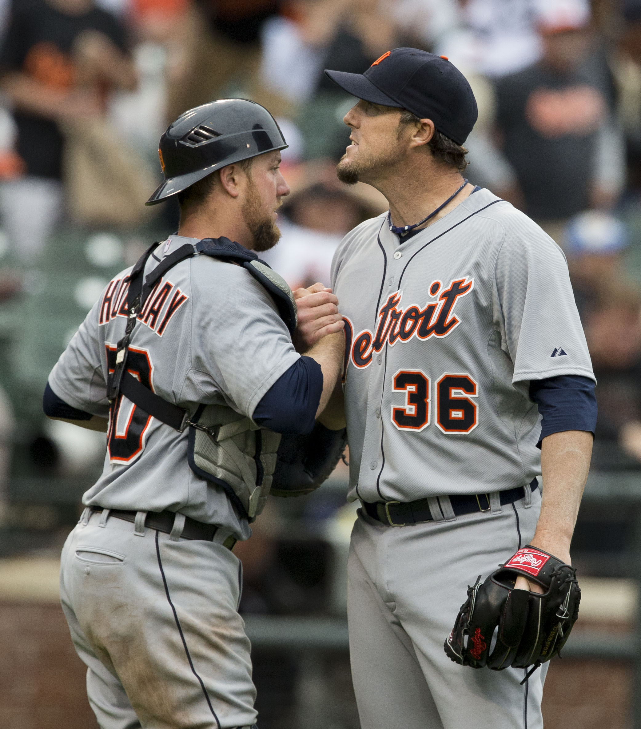 Tigers at Orioles 5/14/14